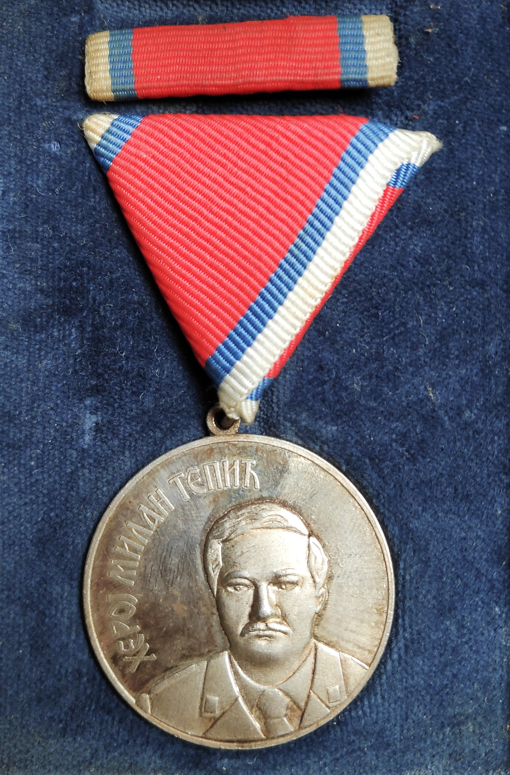 Medalja Milana Tepića (Vojska Republike Srpske)